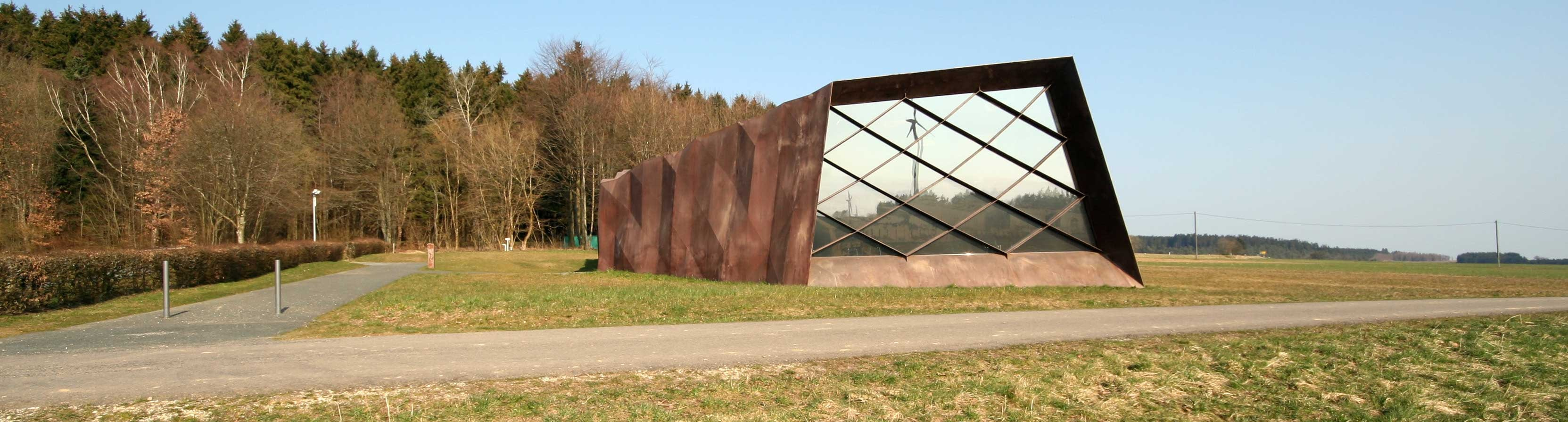 Hinzert concentration camp]